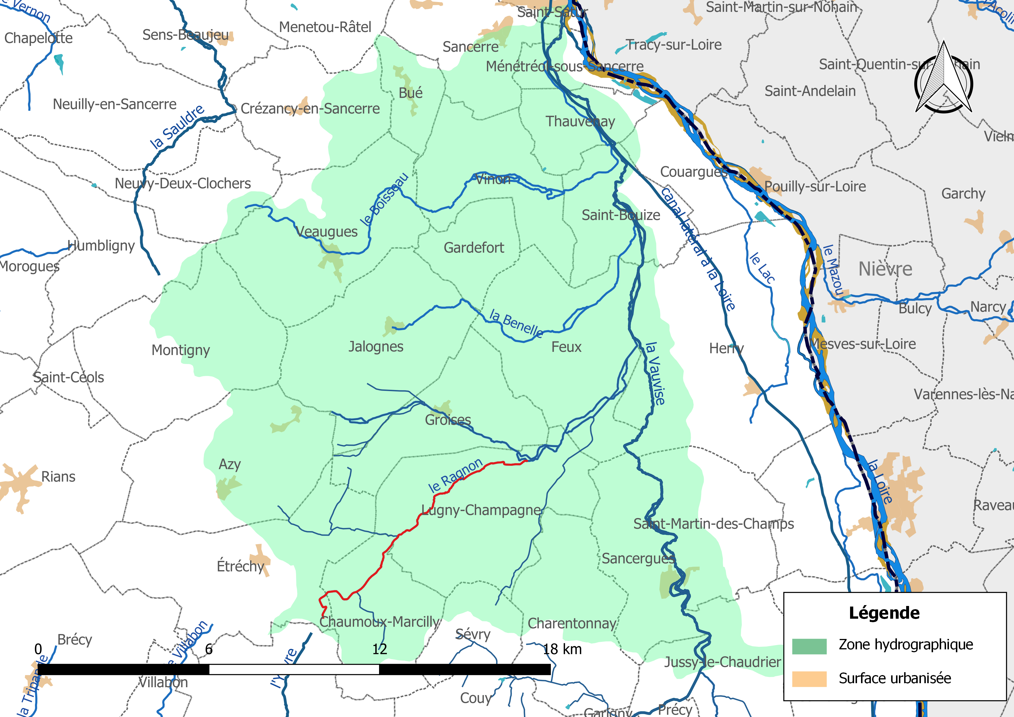 Carte du cours d'eau « le Ragnon » (France) et de la zone hydrographique dans laquelle il s'insère.